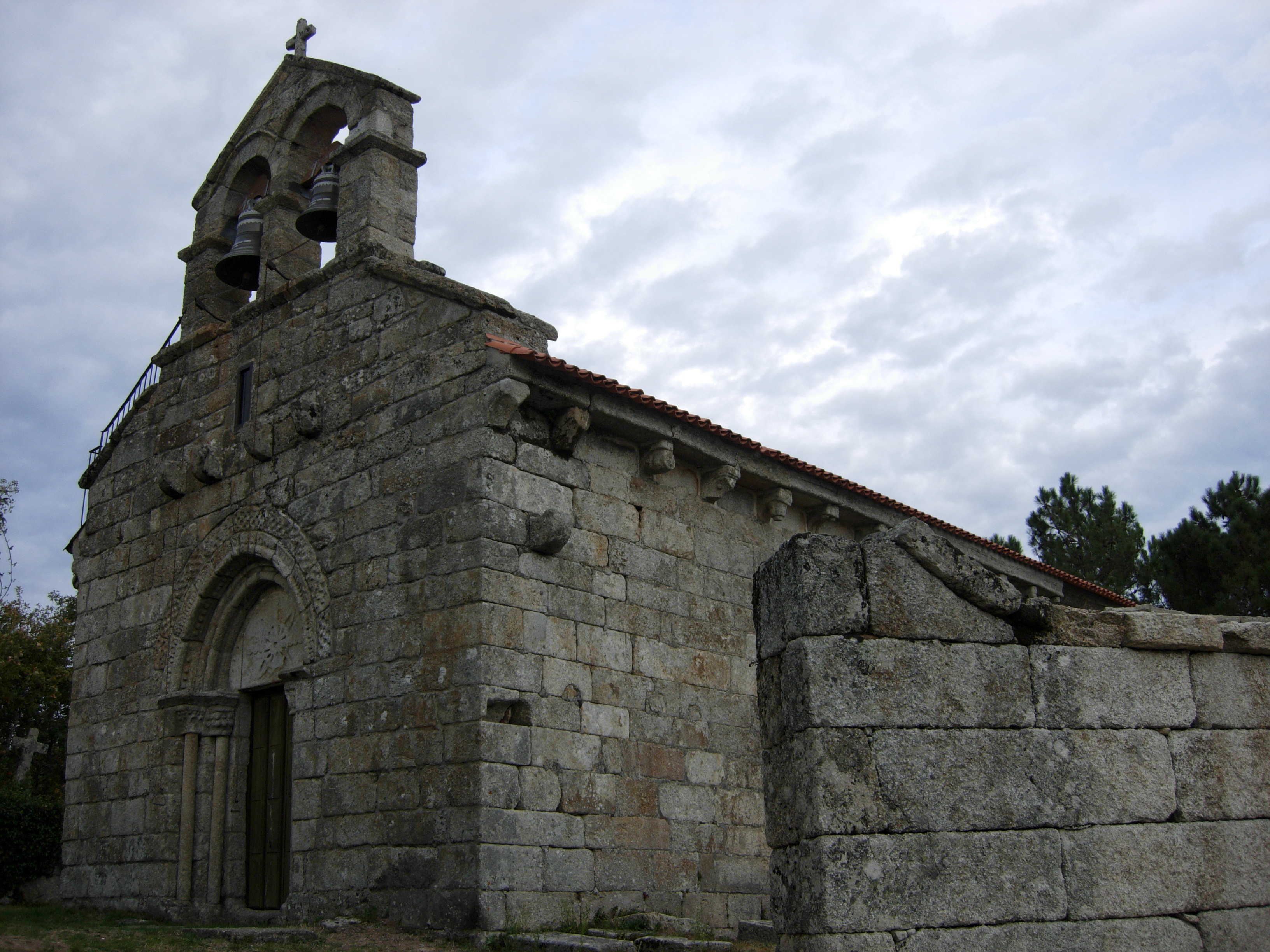 Igrexa de Santo André de Abelenda das Penas, Carballeda de Avia, Galiza. Igrexa construída no século XII.